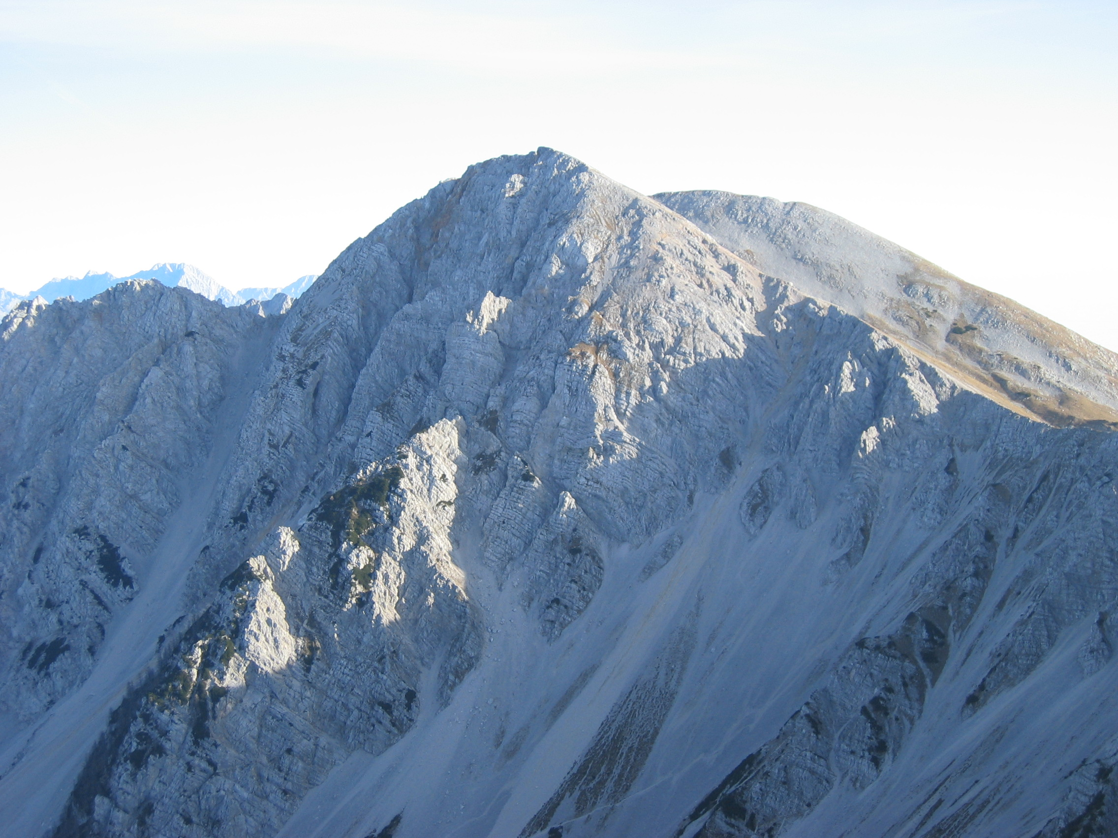 Der König der Karawanken: Der Hochstuhl vom Wainasch aus gesehen. Foto: E. Pirker